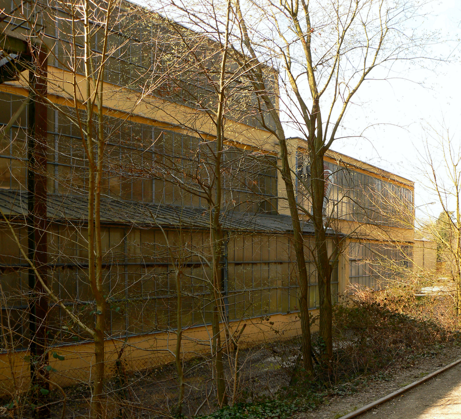 AMCO-Fabrikerweiterungsgebäude, links der dreigeschossige Hauptbau, rechts der ursprünglich eingeschosssige Vorbau mit nachträglicher Aufstockung